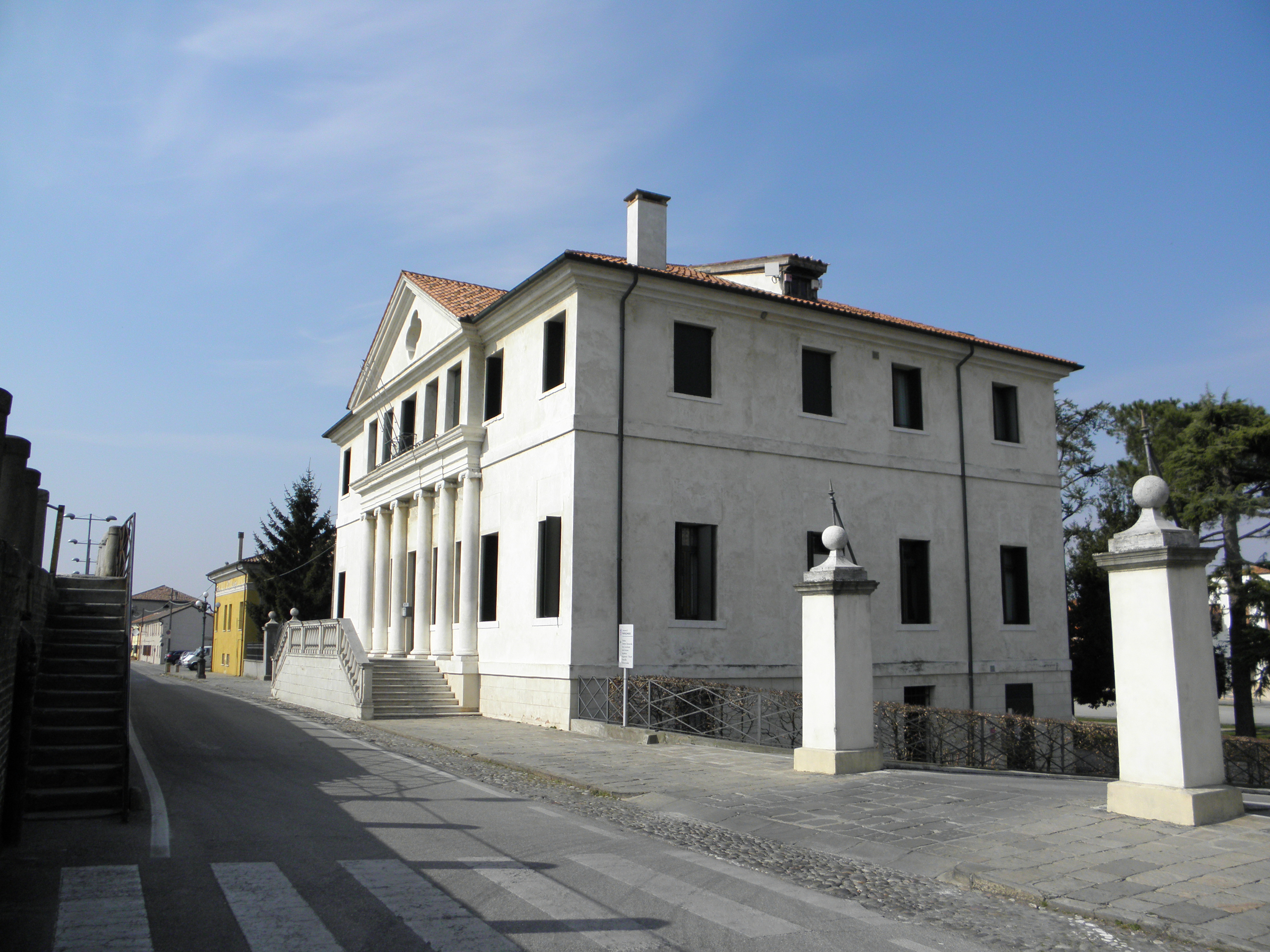 Pontelongo, Villa Foscarini Erizzo, sede del Municipio.